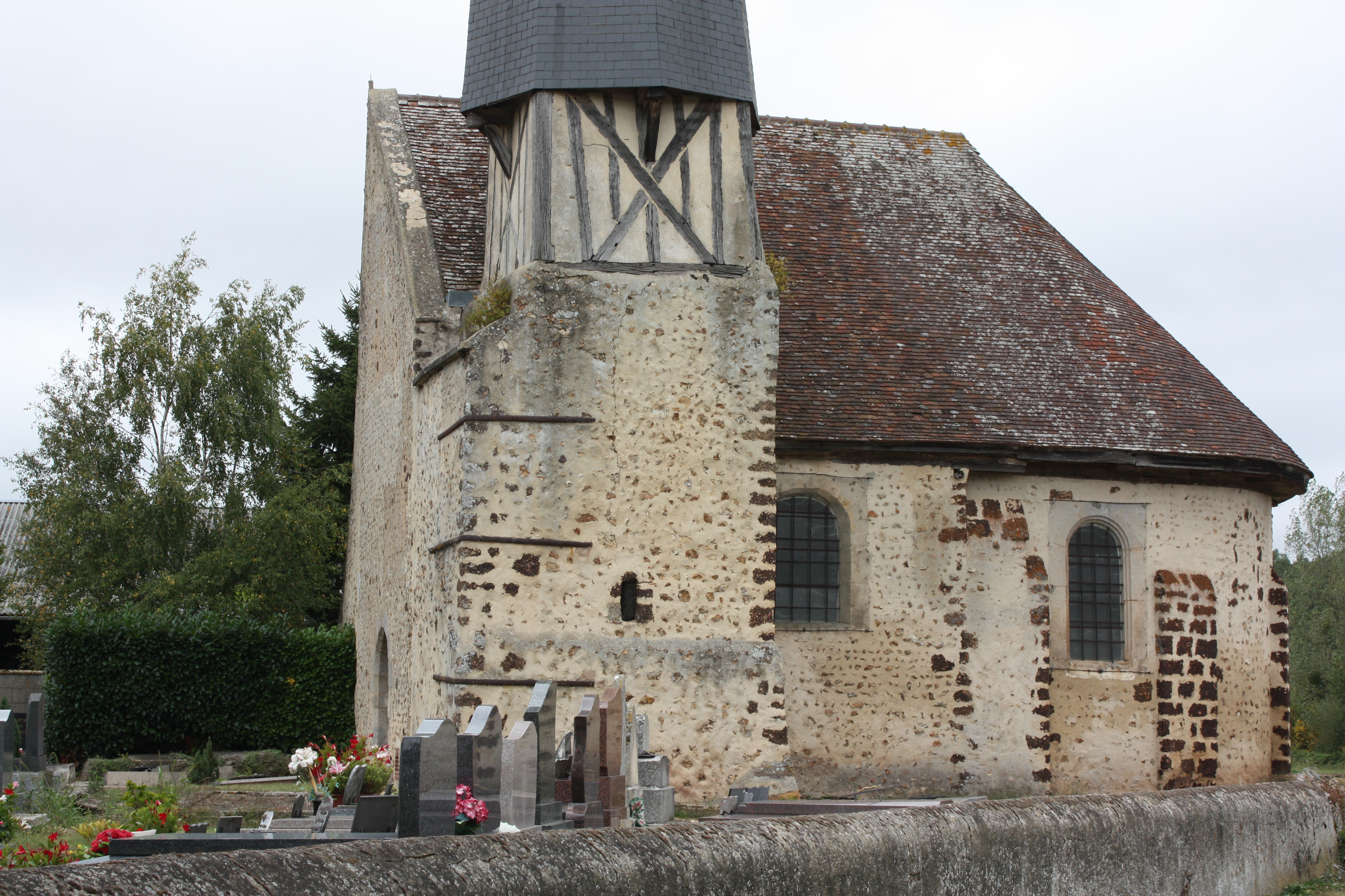 Saint-Lubin-de-Cravant - Eglise Saint-Lubin Vue du Sud